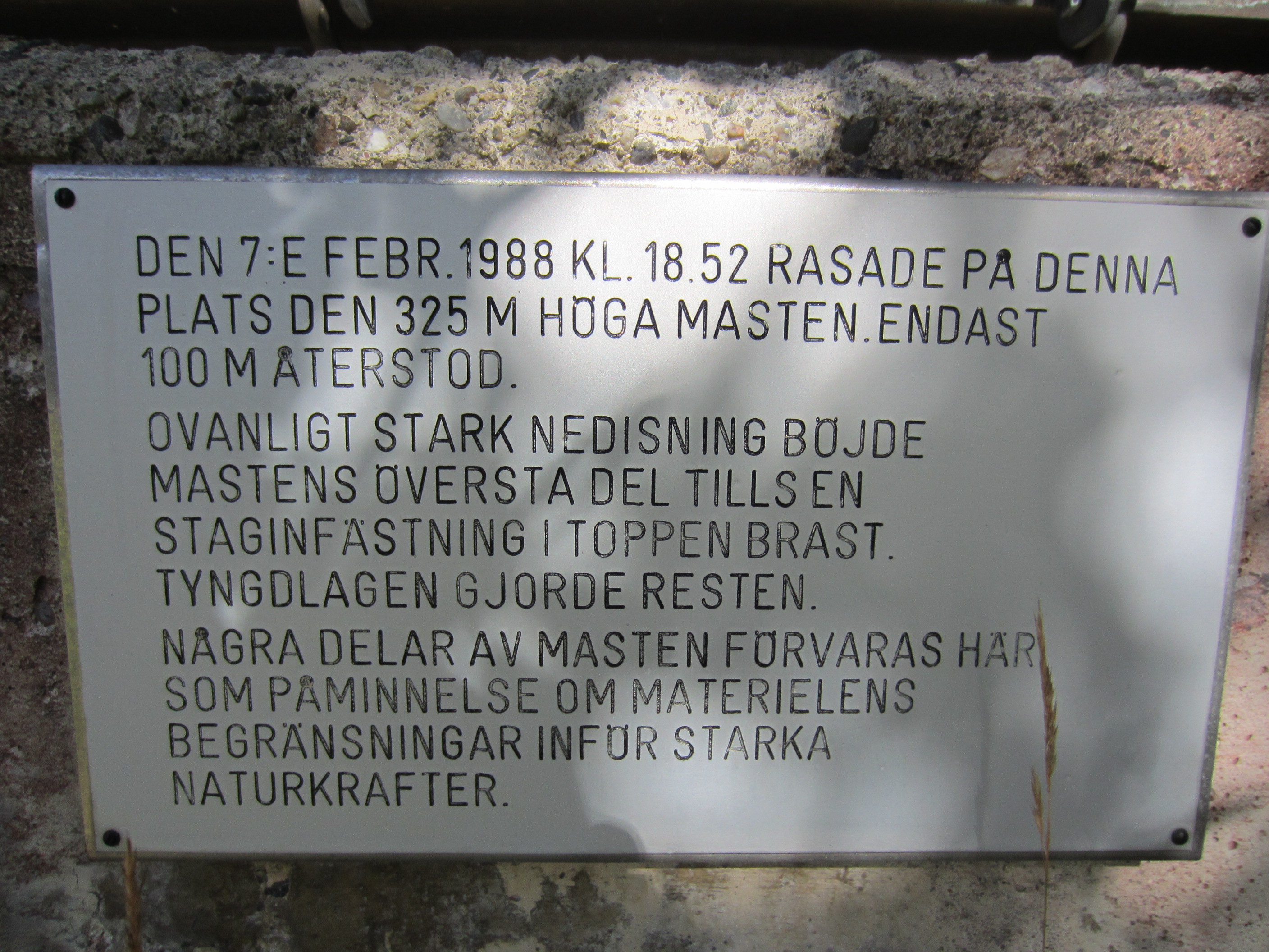 Infotafel an der abgebrochenen Sendemastspitze Multra auf schwedisch.